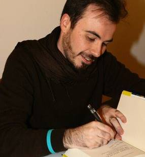 Davide Simon Mazzoli alla presentazione di Midendhil - Mondadori Piazza Duomo - Milano